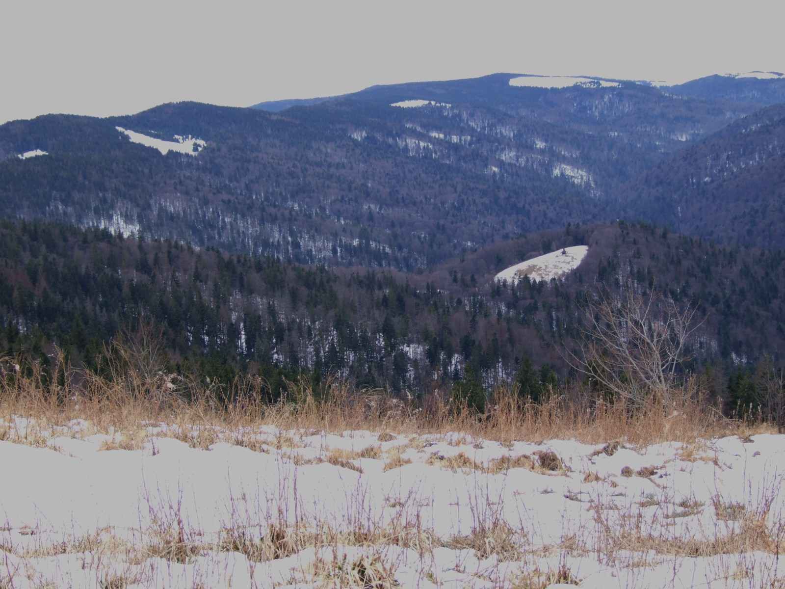 Gorc Kamienicki. Widok na Jaworzynkę Kamienicką i polanę Ustępne